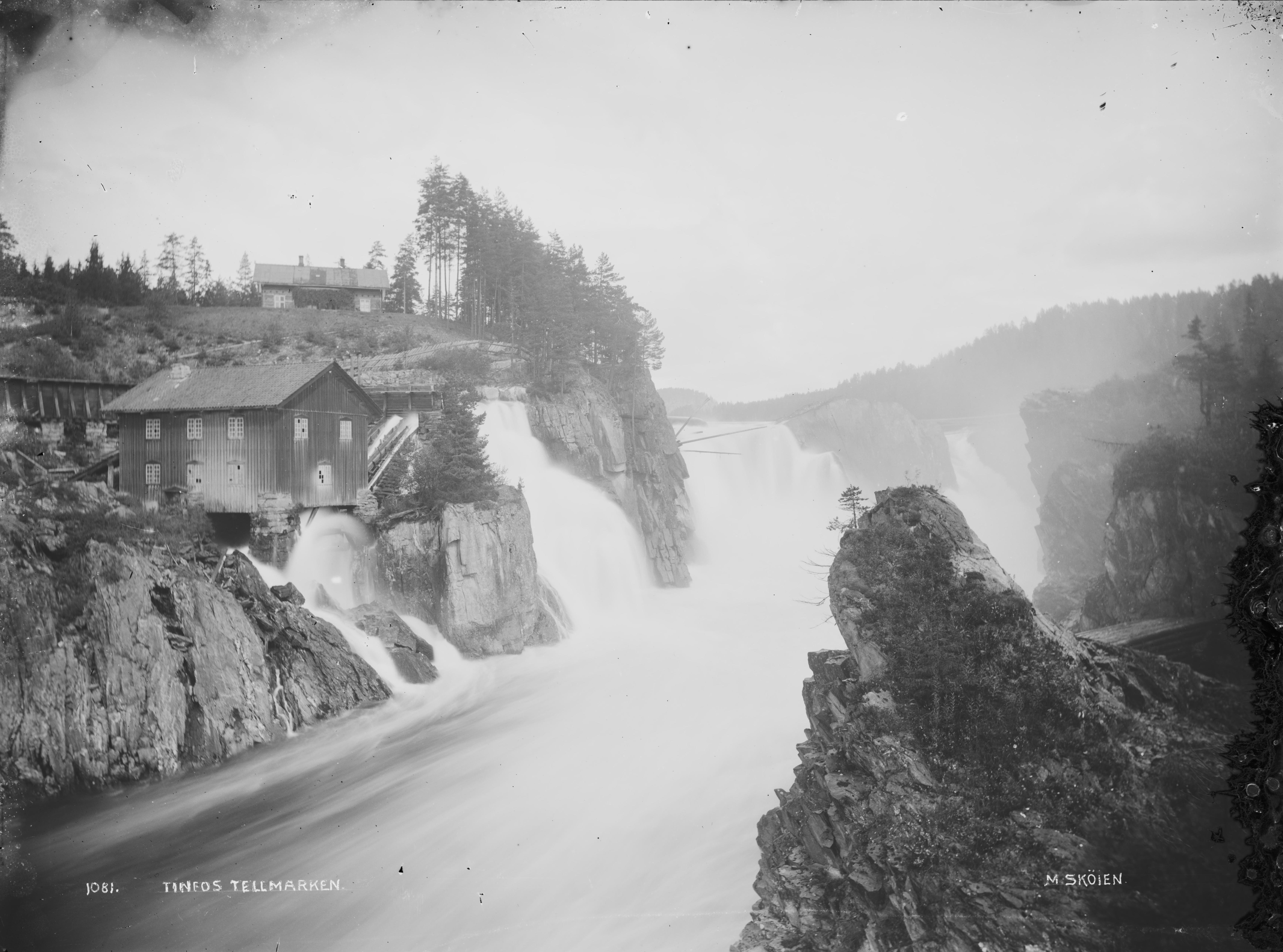 Påskrift negativ: 1081 Tinfos Telemarken M. Skøien Påskrift konvolutt: B167 Heddal Tinnfossen ved Notodden [Riksantikvaren] Sted: Tinnfoss Kommune: Notodden Fylke: Telemark Tagger: landskap foss elv